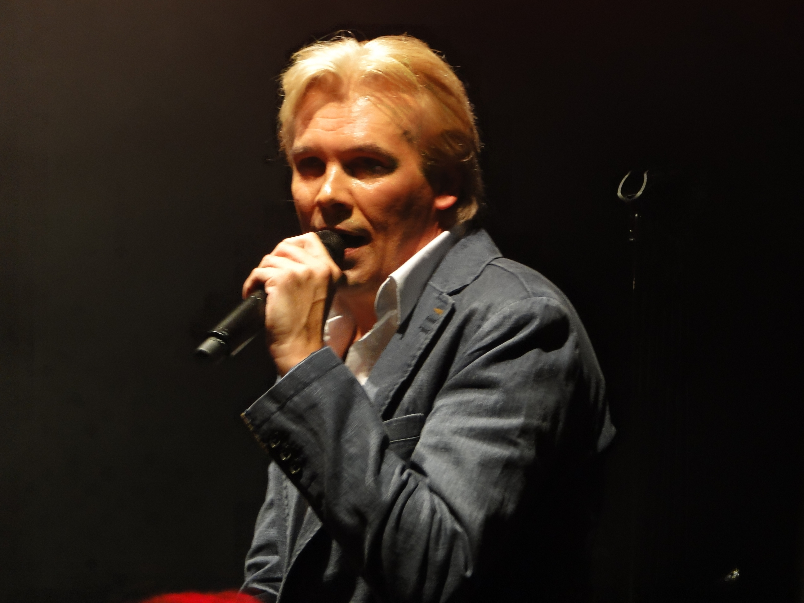 Schlagersänger Jens Bogner im August 2013 in Dresden